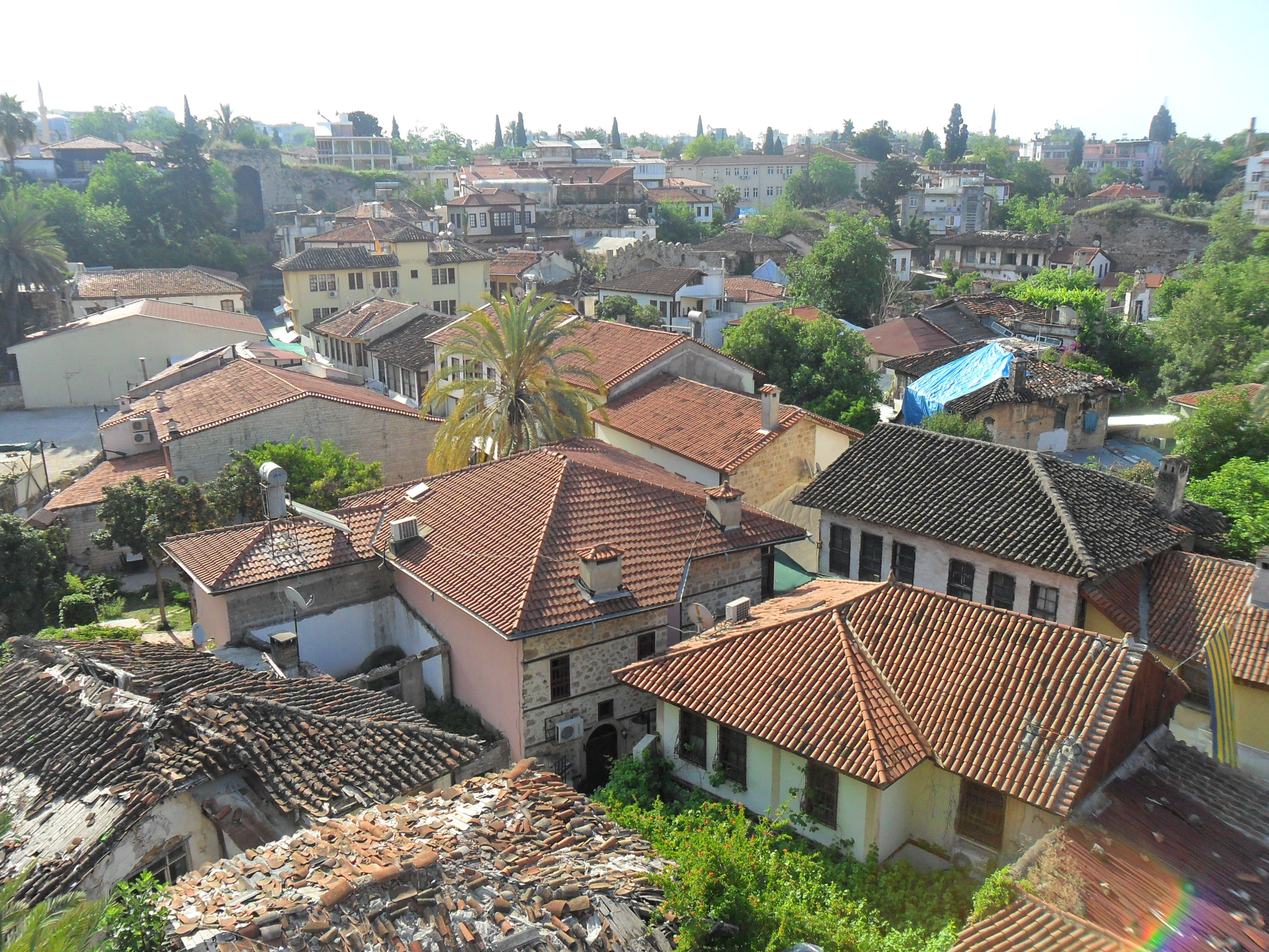 Antalya'nın tarihî merkezi Kaleiçi'nden bir görünüm.